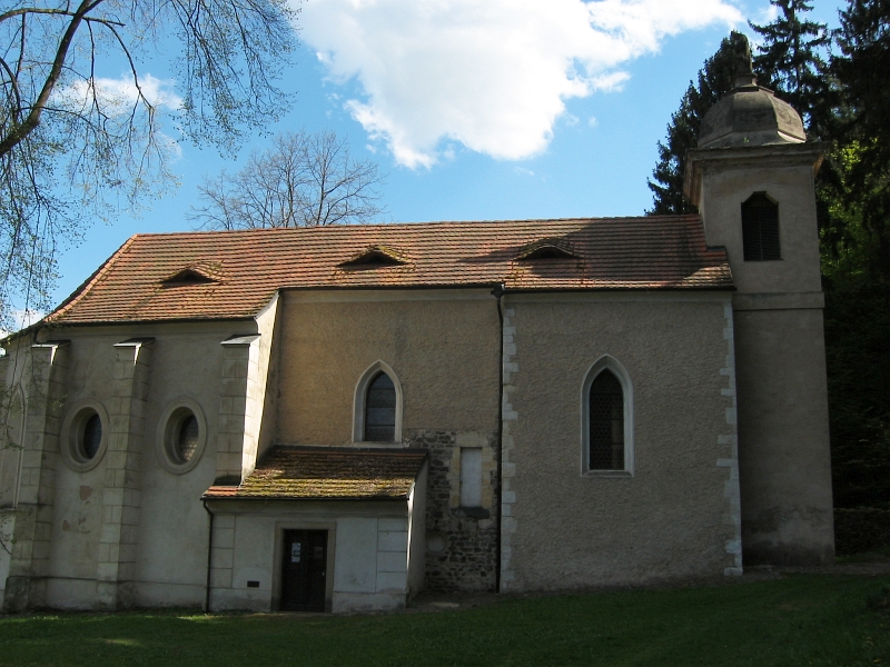 Kostel svatého Kiliána, Kiliánská, Svatý Kilián, Davle